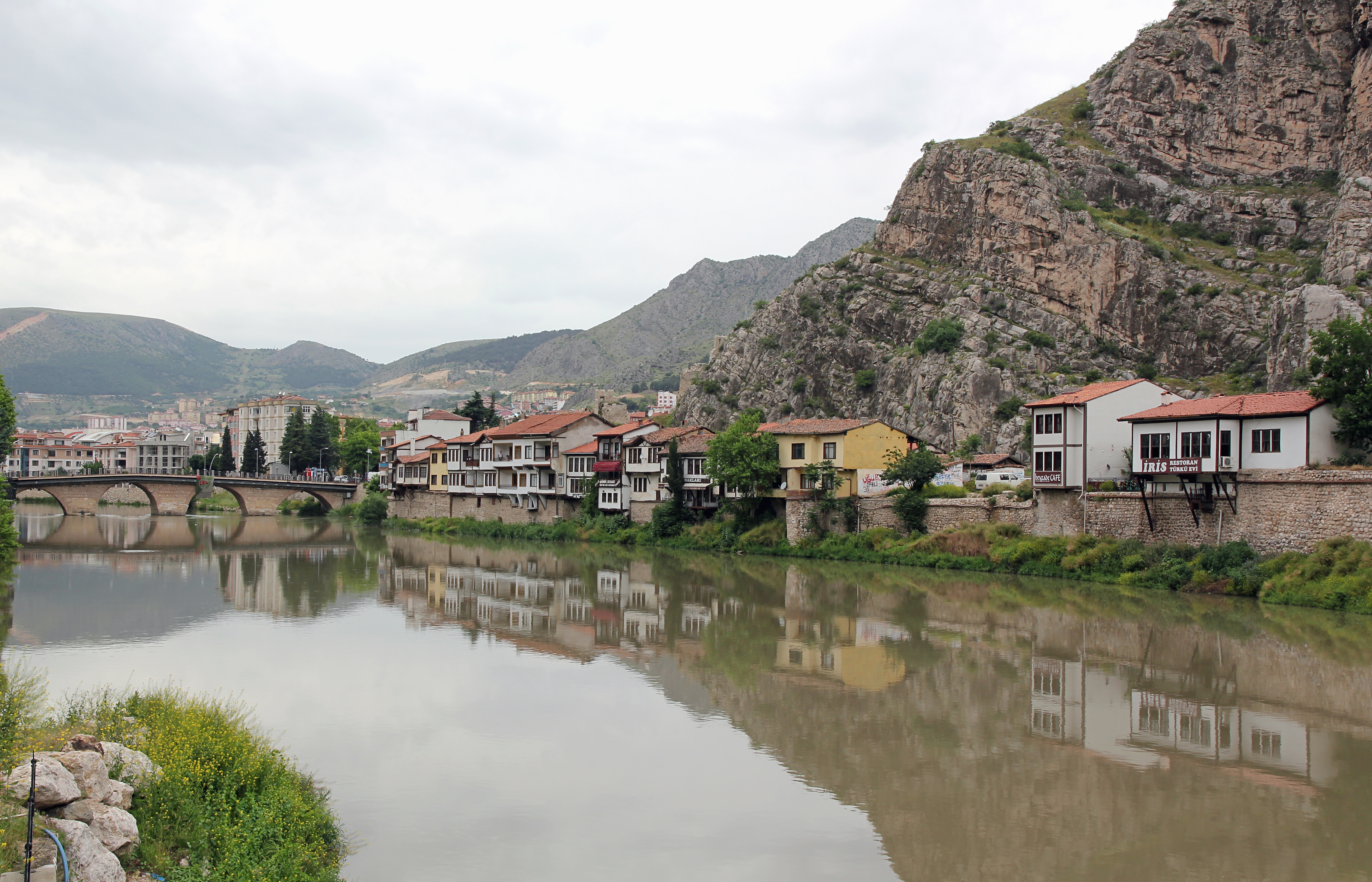 Amasya, Nordtürkei